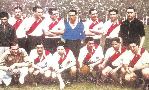 CA River Plate (1936). Arriba: Vassini, Santamaría, Cuello, Sirni, Minella y Wergifker. Abajo: Cesarini, Bernabé Ferreyra, Moreno, Pedernera y Peucelle.